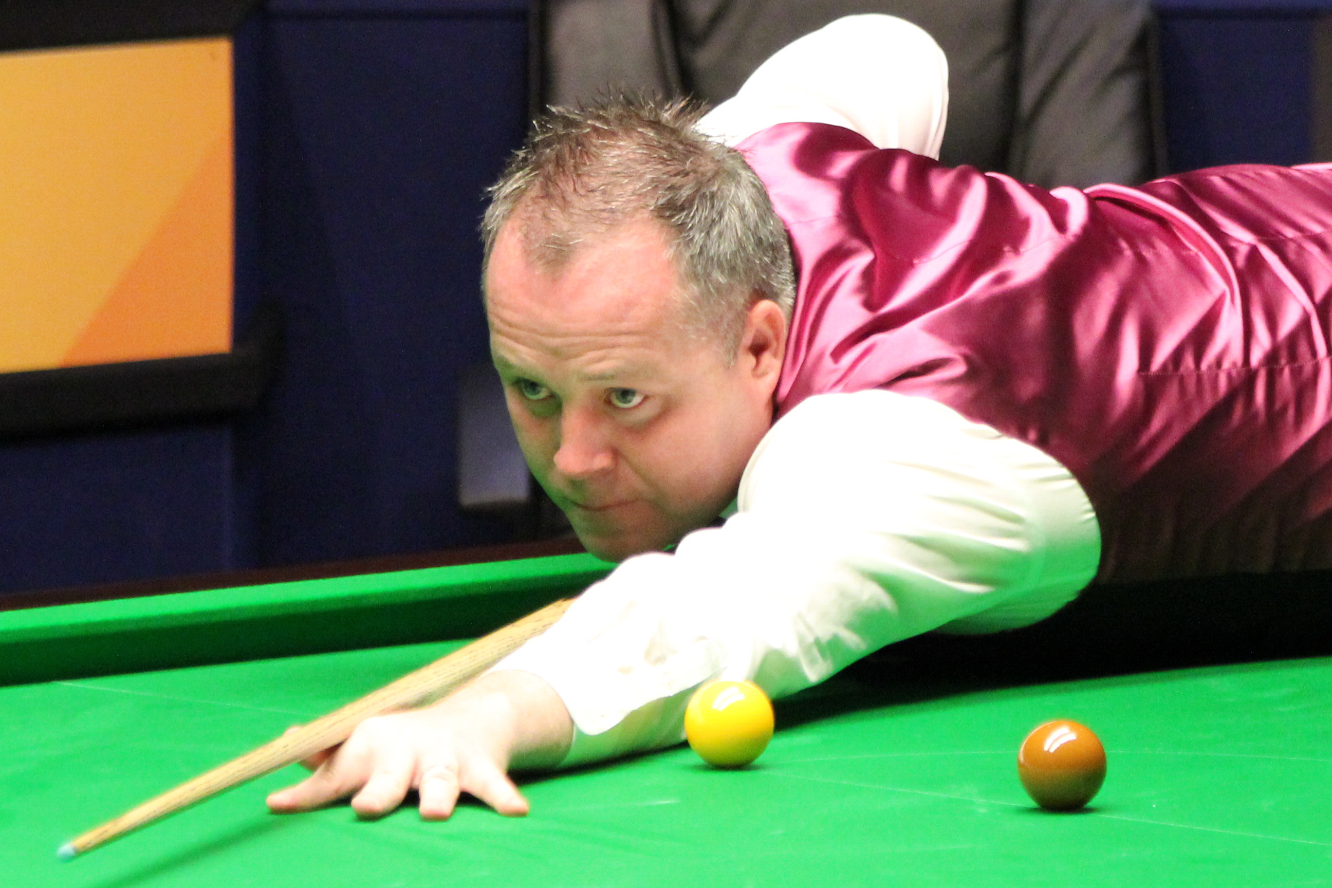 John Higgins beim Paul Hunter Classic 2012